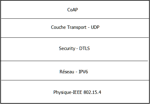 DTLS dans le stack de protocoles IPV6